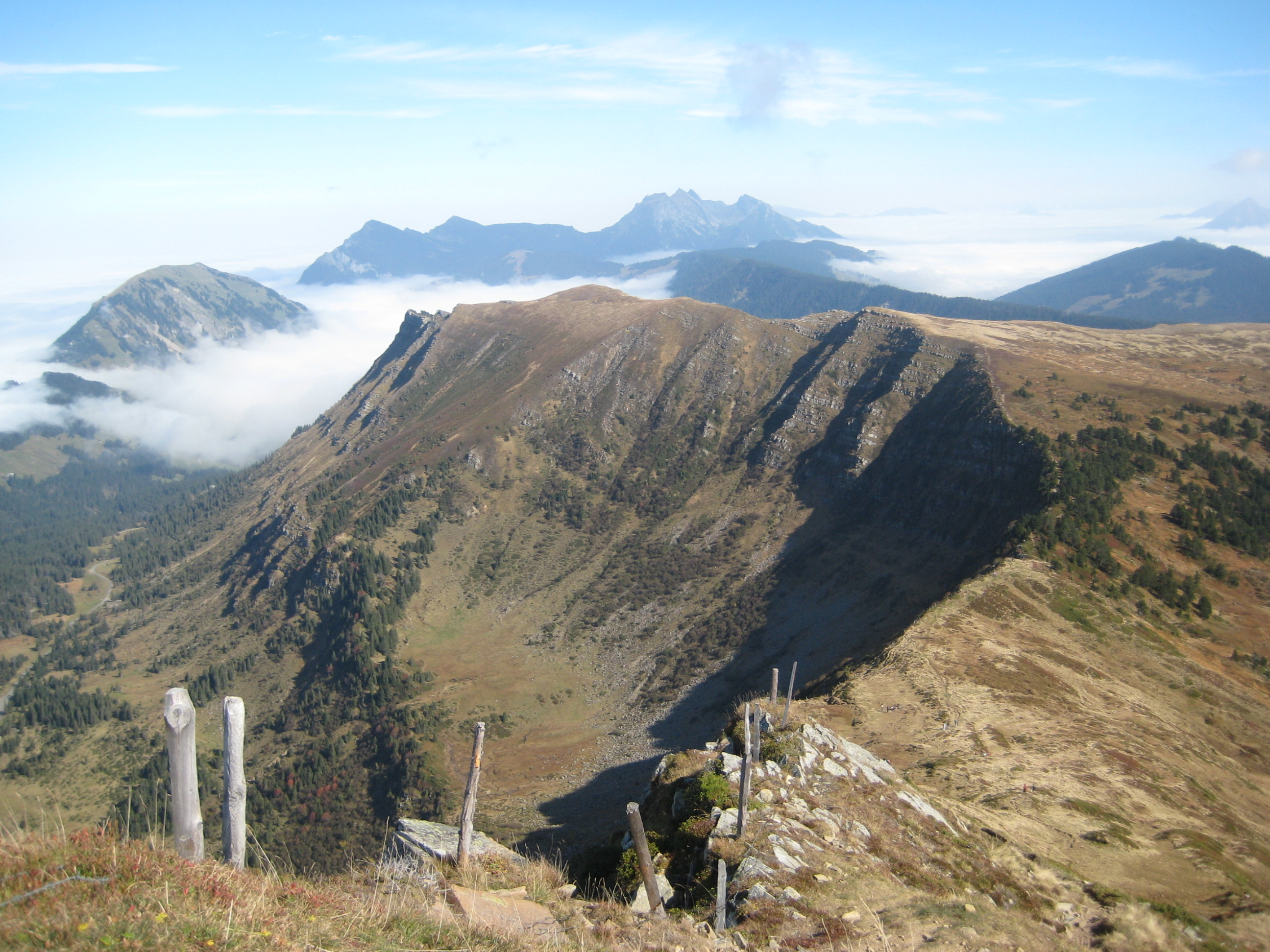 Wissguber (1941 m) vom Fürstein-Gipfel im Südwesten gesehen. Im Hintergrund aus dem Nebelmeer das Pilatus-Massiv